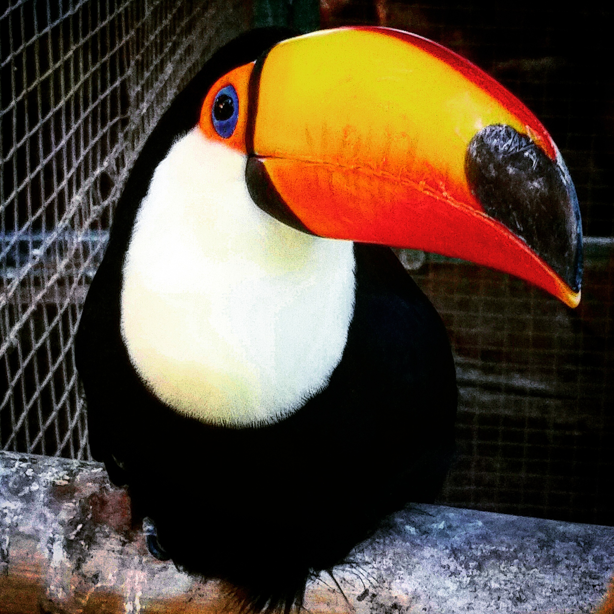 תוקן טוקו